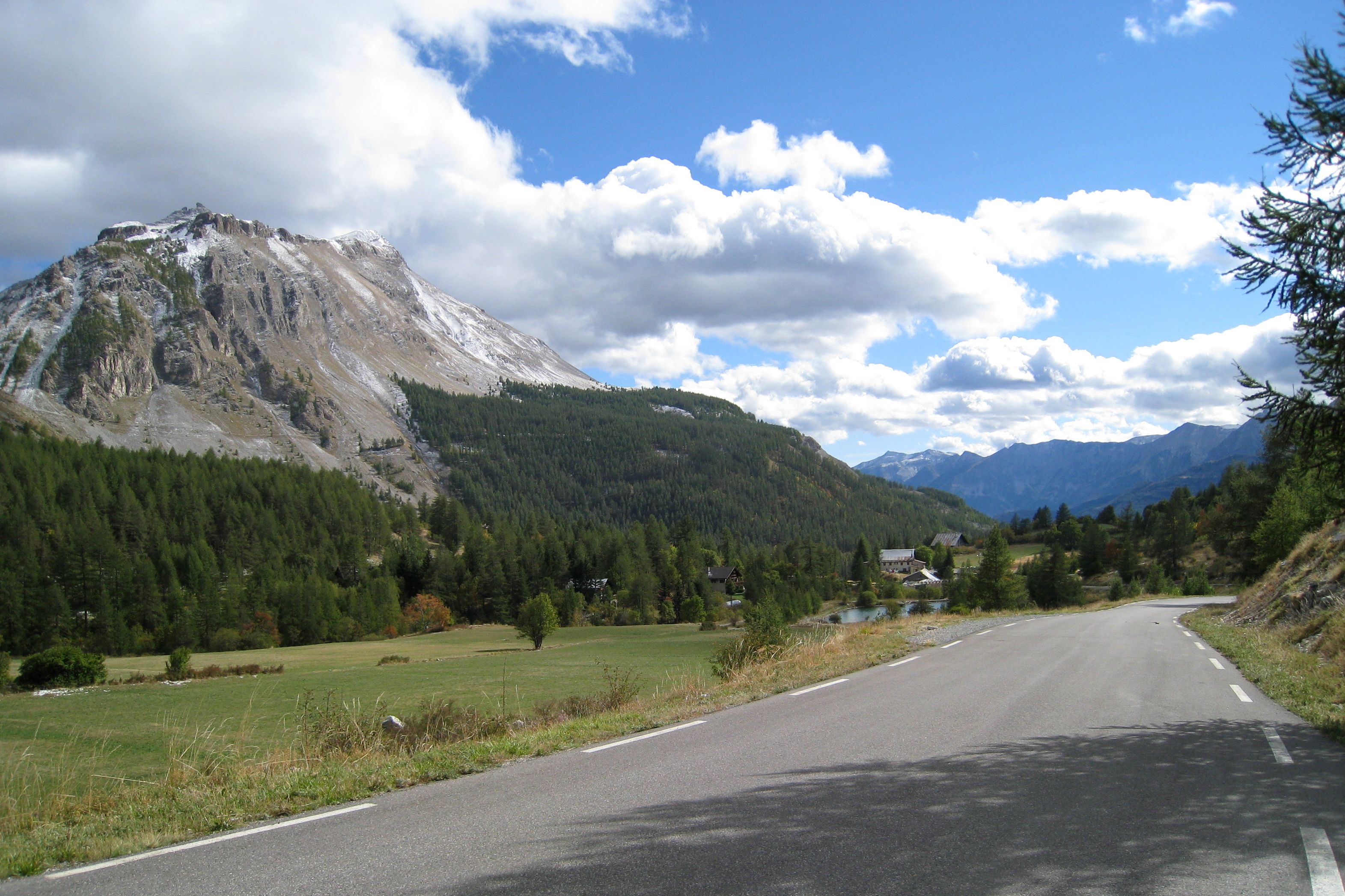 Estenc (commune d'Entraunes) : de la route des Grandes Alpes, vue sur le verrou glaciaire d'Estenc avec la source officielle du Var et le petit lac dominés par le massif de Roche-Grande (2753 m), dépt. 06, France